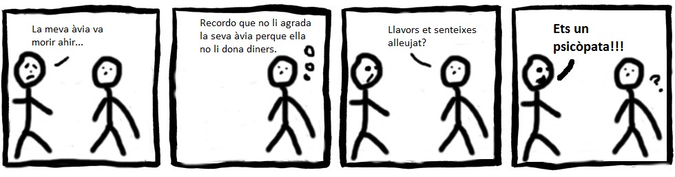 Traducció FR → CA del fitxer «Autisme-les émotions» de Tsaag Valren.